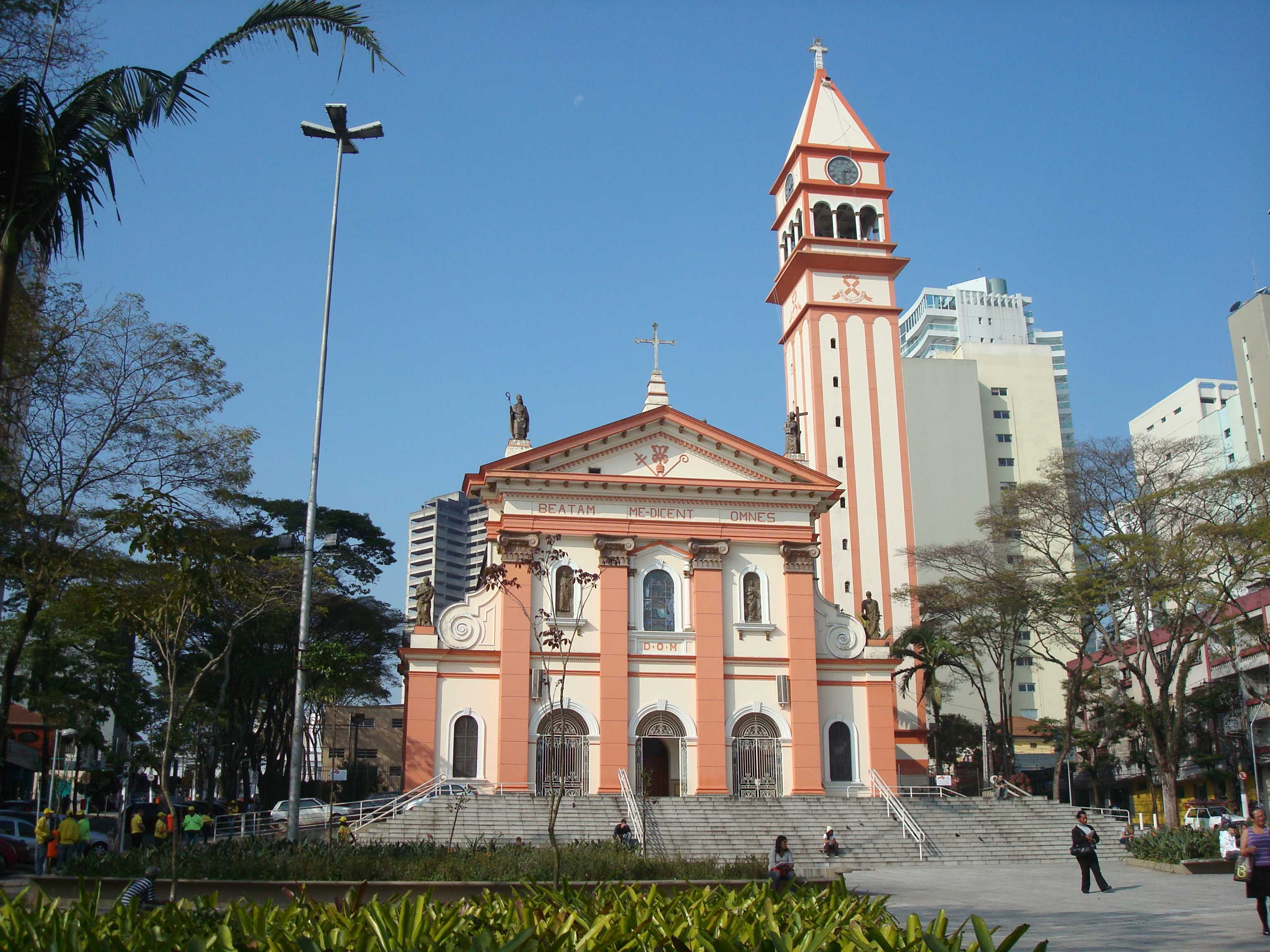 Visão da Igreja Matriz de São Bernardo do Campo